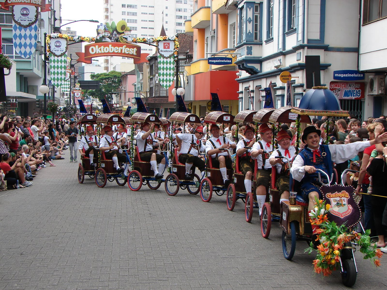 Oktoberfest - A maior festa alemã das Américas - Blumenau – SC